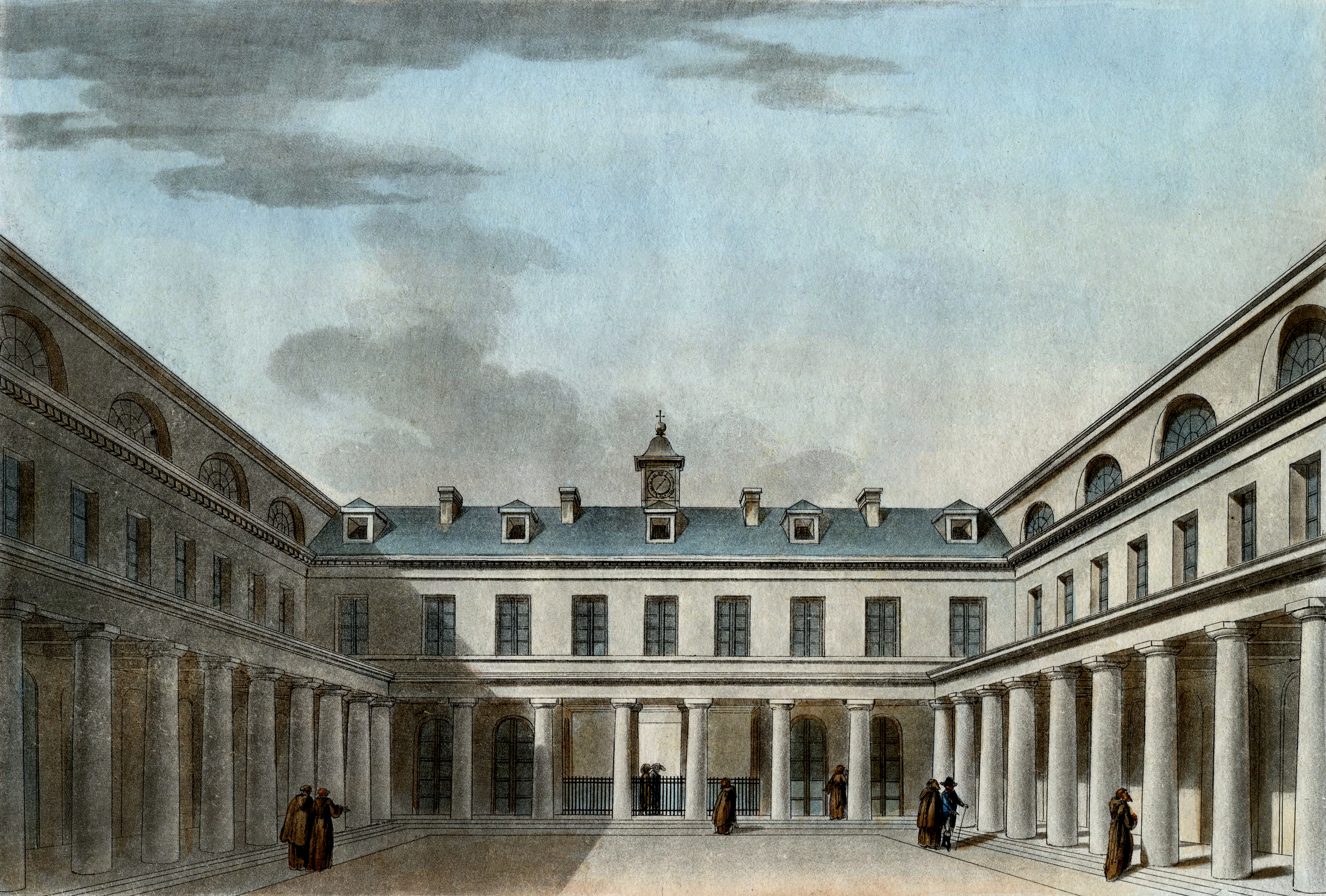 Lycée Condorcet, Paris, France.